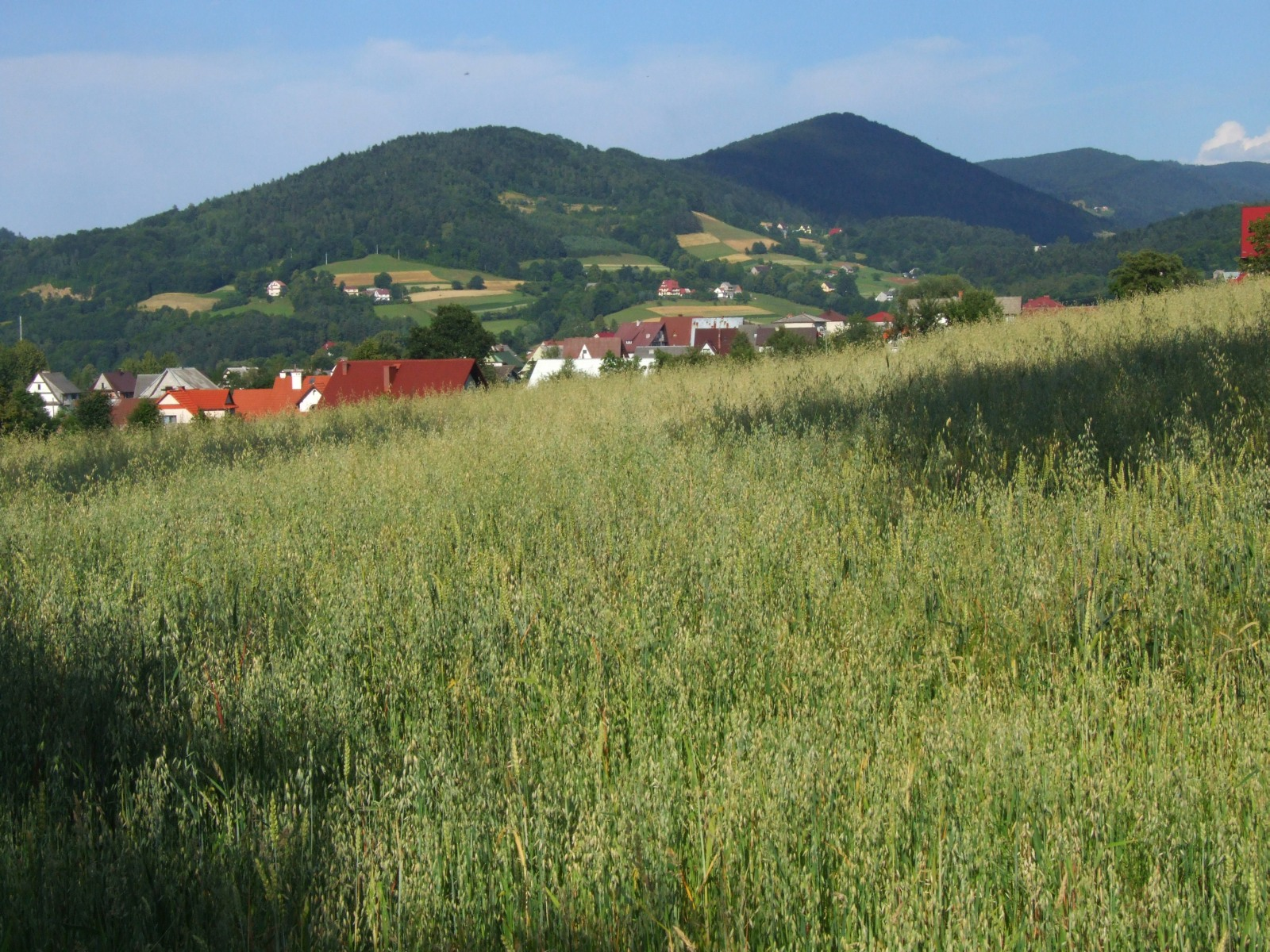 Pasmo Łososińskie. Widok z Łososiny Gornej